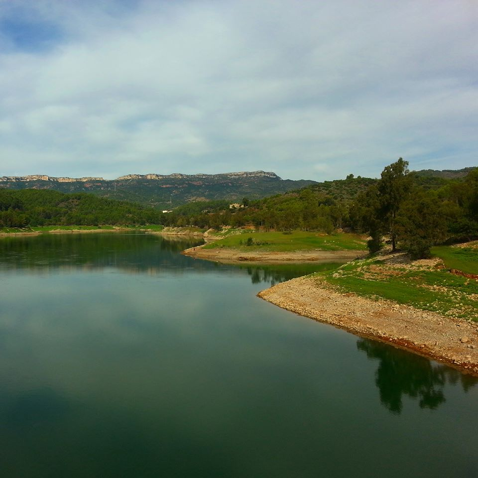 Vista del pantà